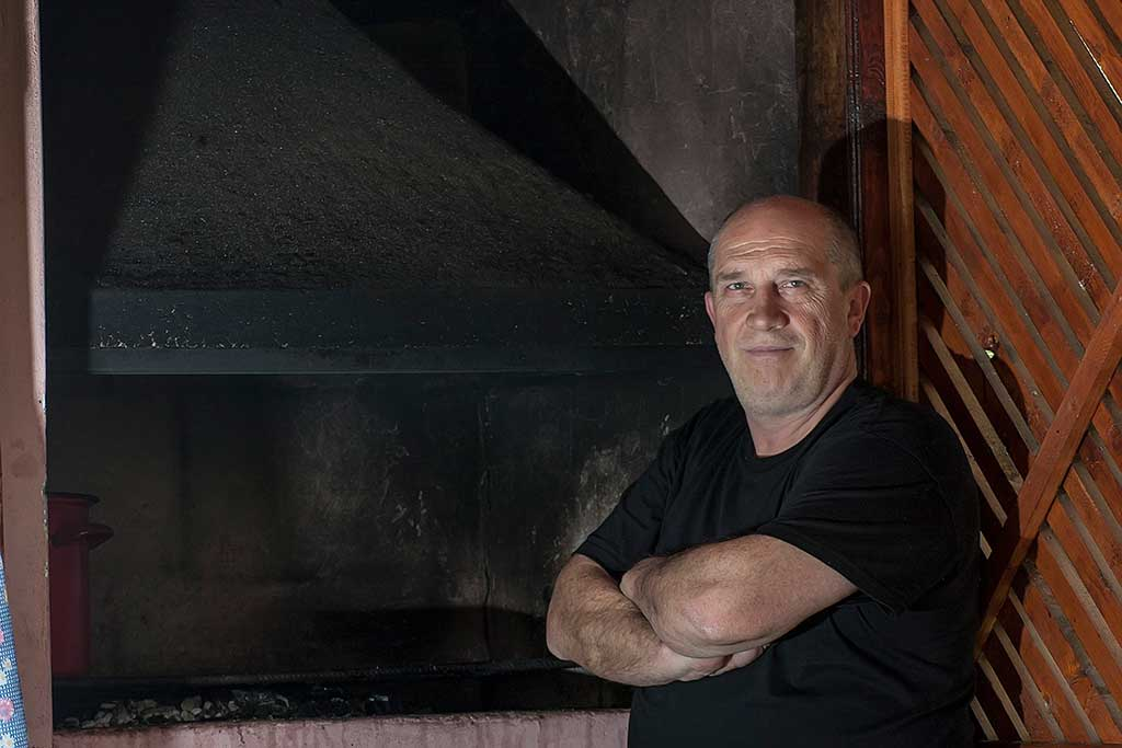 Geeorge Ostafi